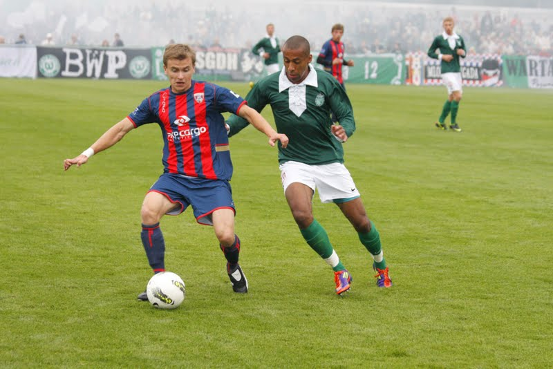 Mecz pamiątkowy Warta Poznań - Pogoń Lwów